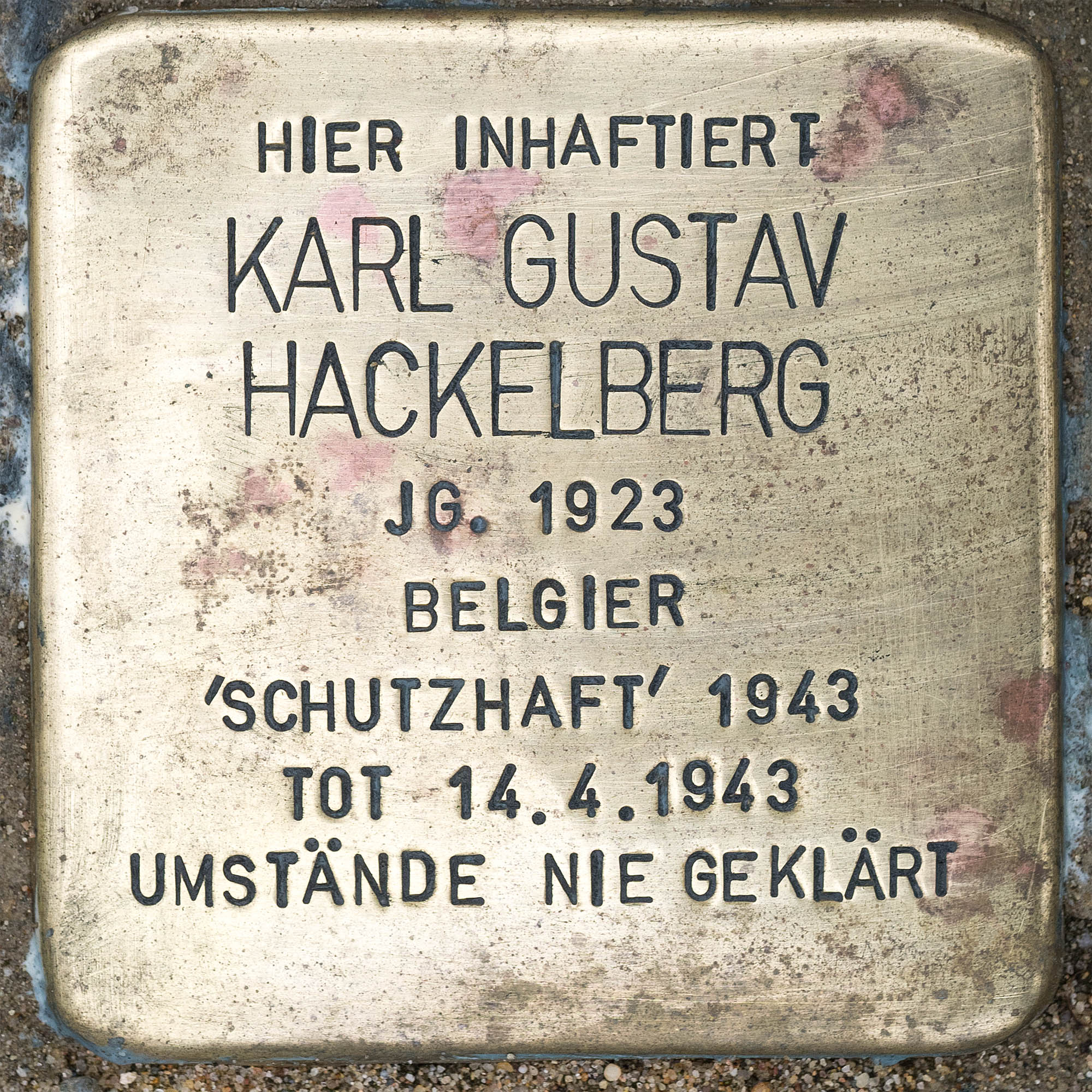 Stolperstein für Hackelberg, Karl Gustav